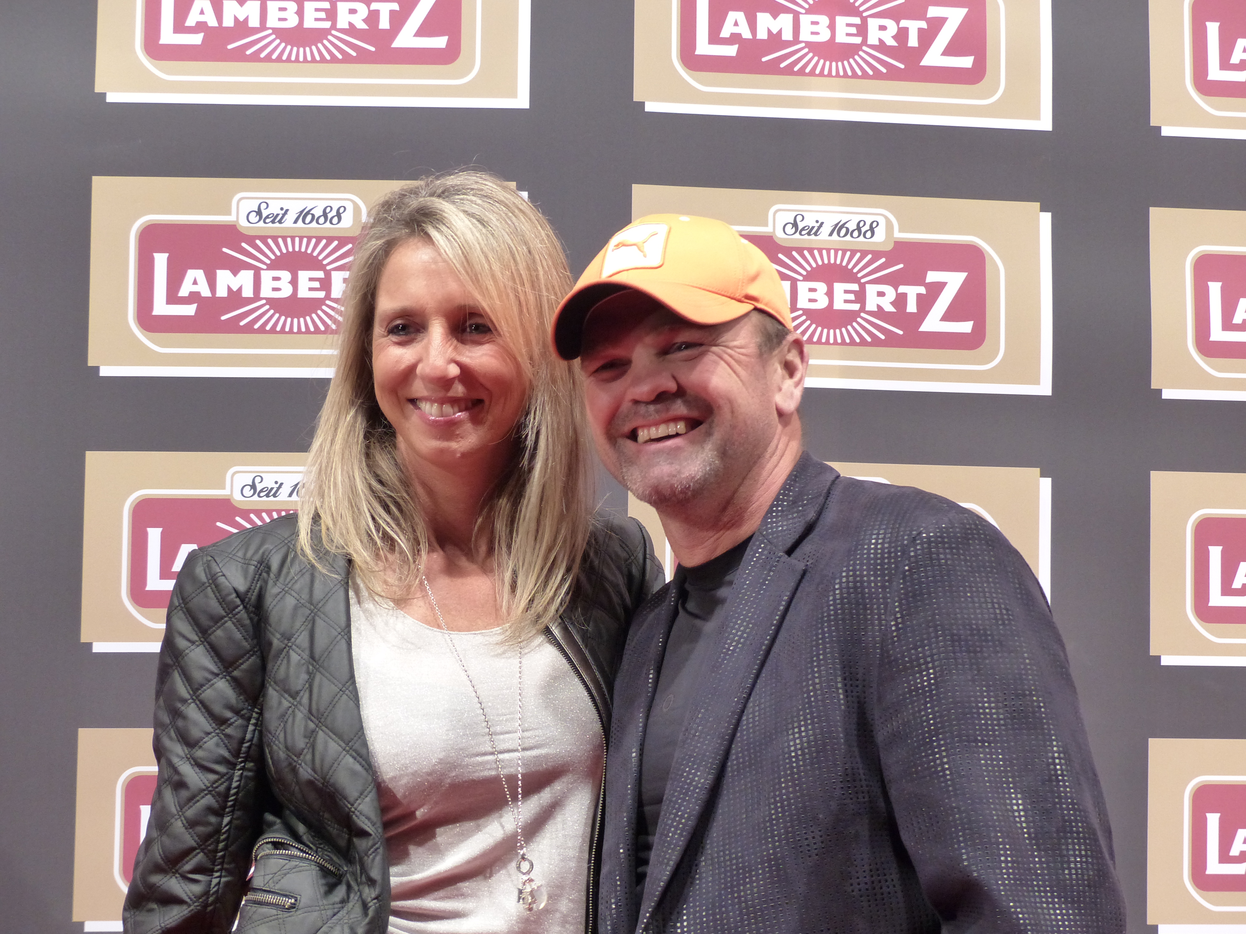 Sven Ottke mit Ehefrau Monic Frank bei der Lambertz Monday Night, im Februar 2016.